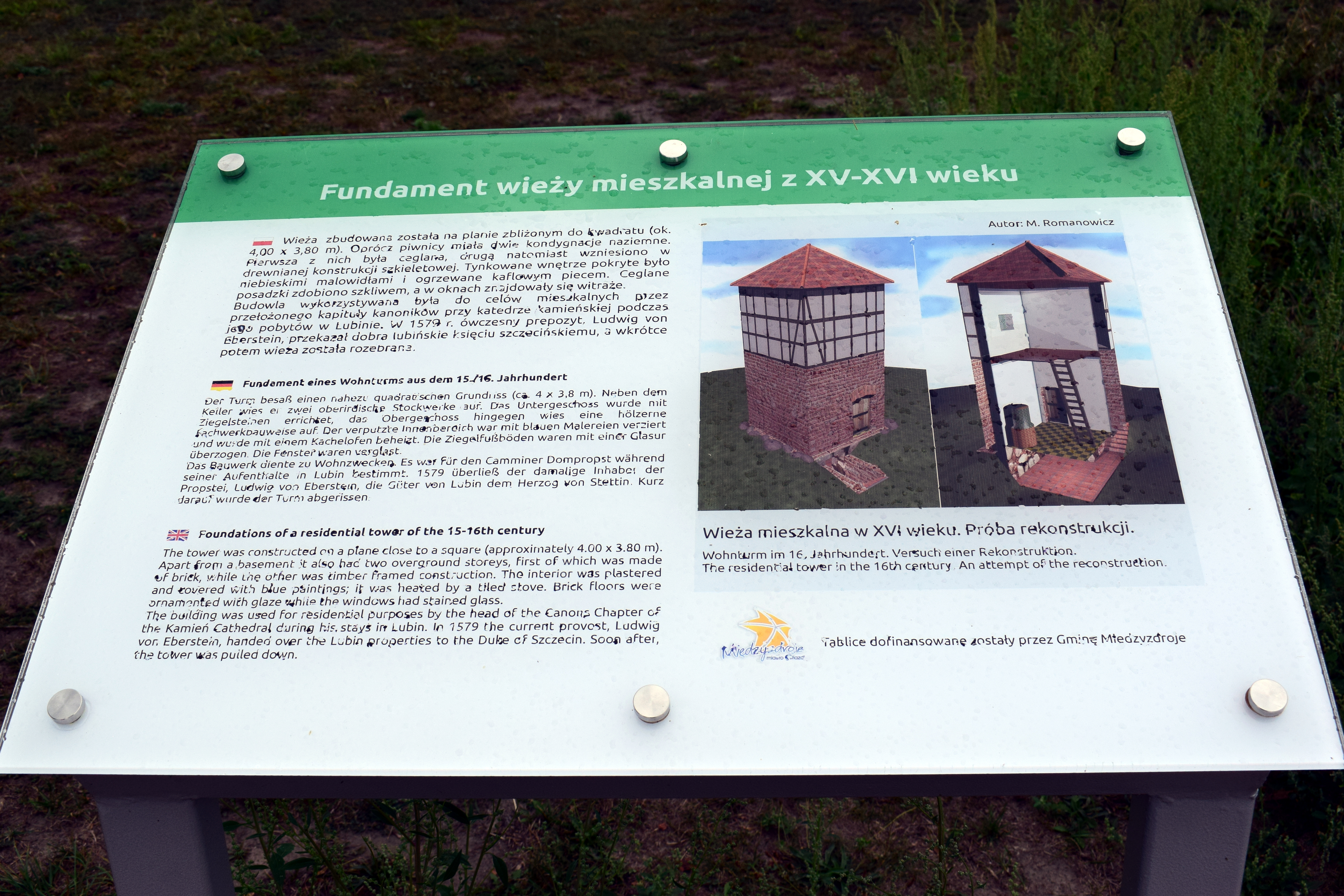 Schautafel am Burgwall Lubin, Informationen zu einem Wohnturm aus dem 15./16. Jahrhundert, Insel Wolin, Polen.